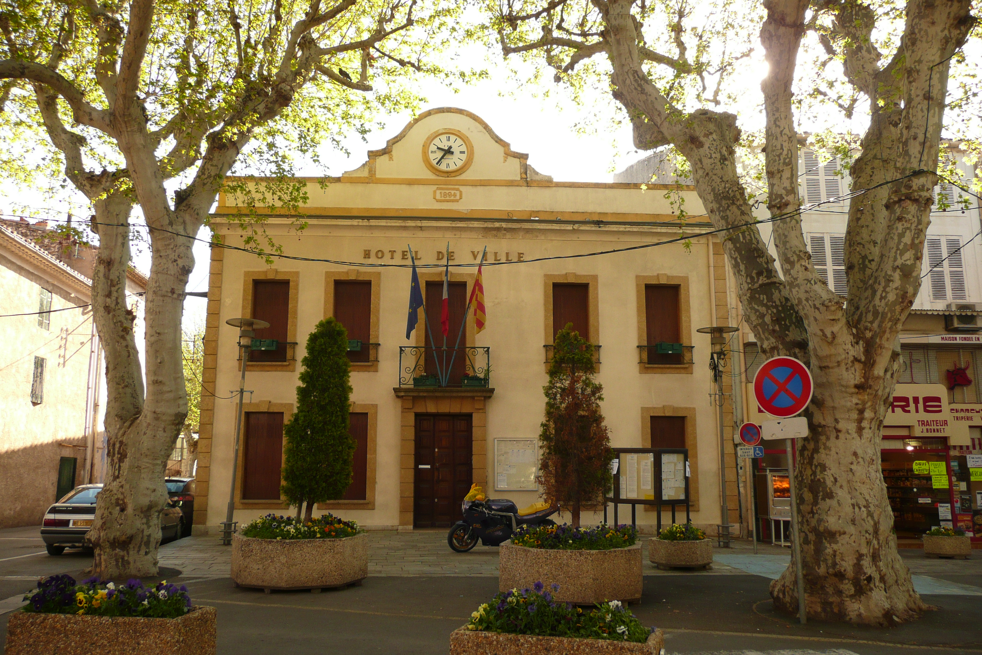 Hôtel de ville à Sénas.